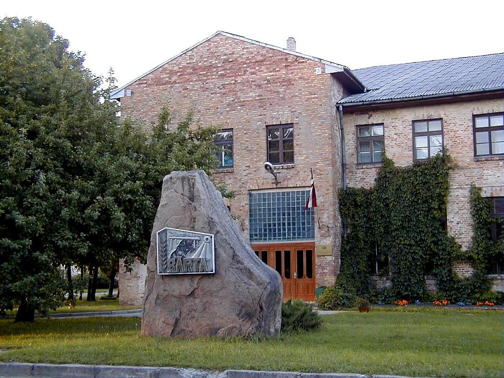 Bārtas pagastnams un piemiņas akmens 2002-08-03